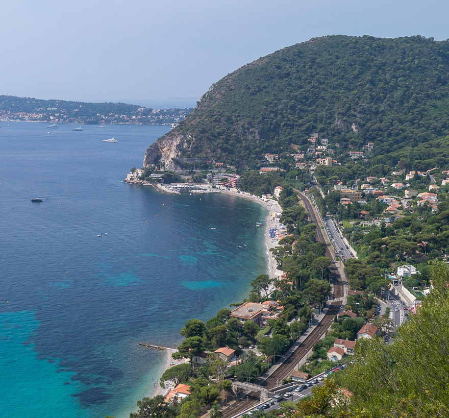 Èze-sur-Mer, vue du chemin de Nietzsche , PACA, France